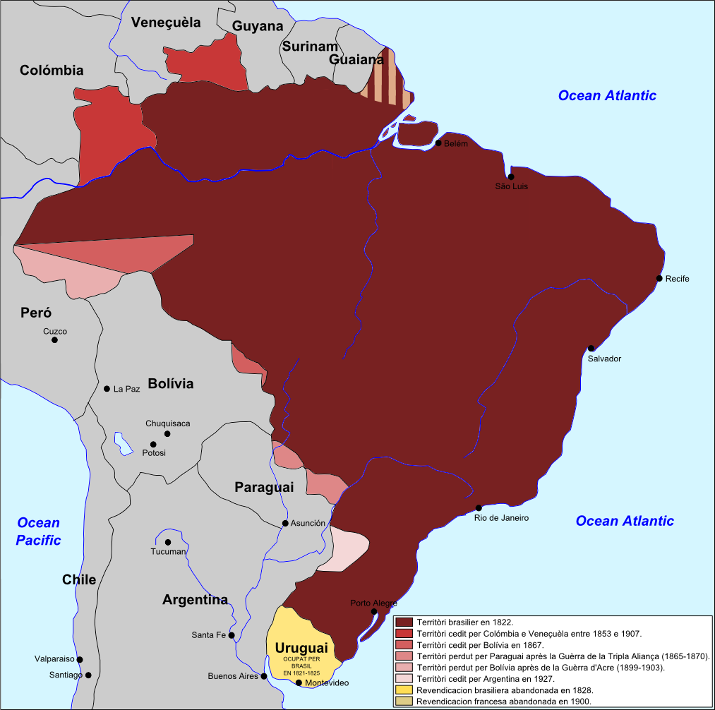 Evolucion territòriala de Brasil après l'independéncia.